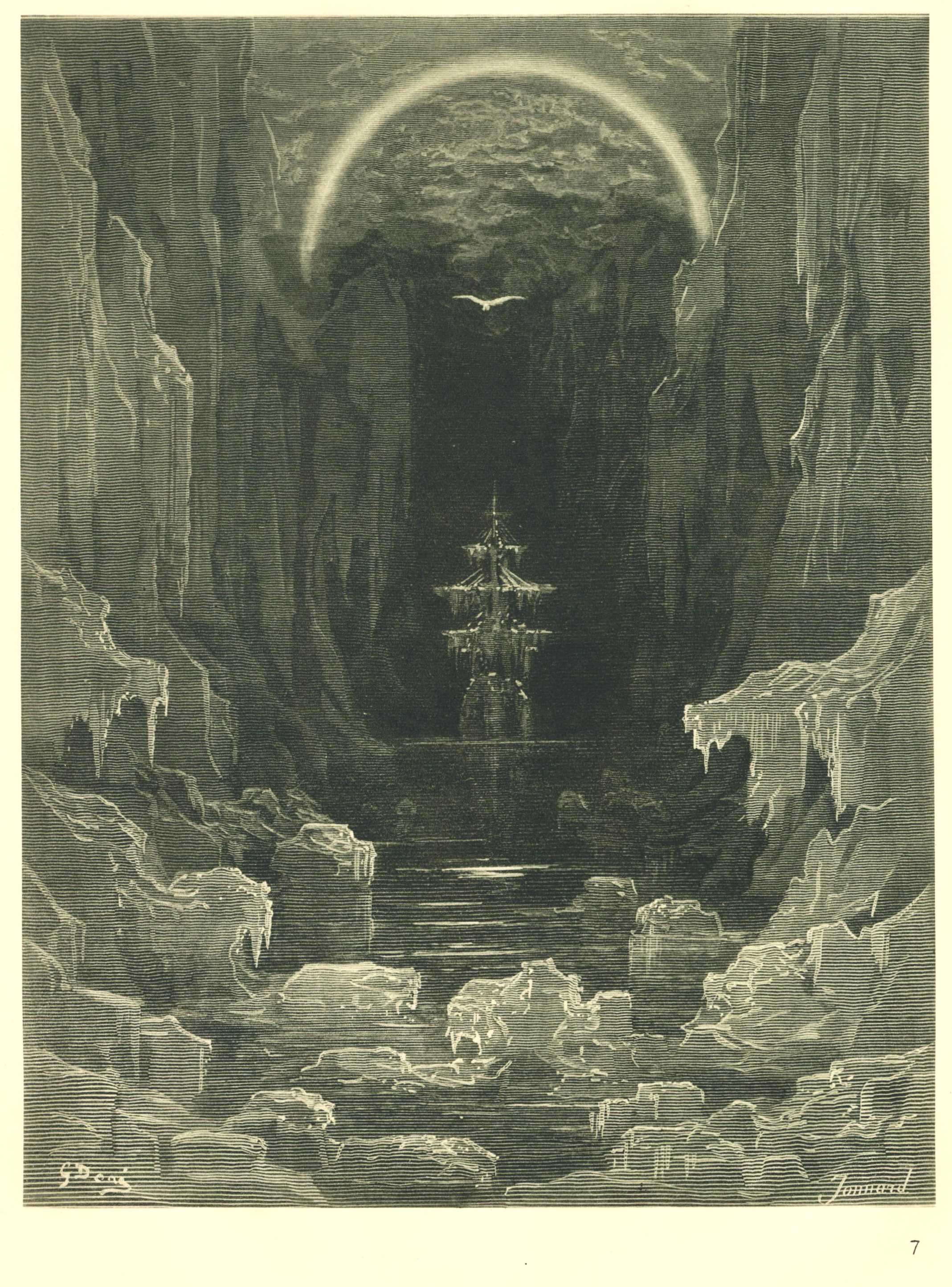 Das Eis war hier, das Eis war dort, das Eis war überall (Beschreibung lt. Quelle)